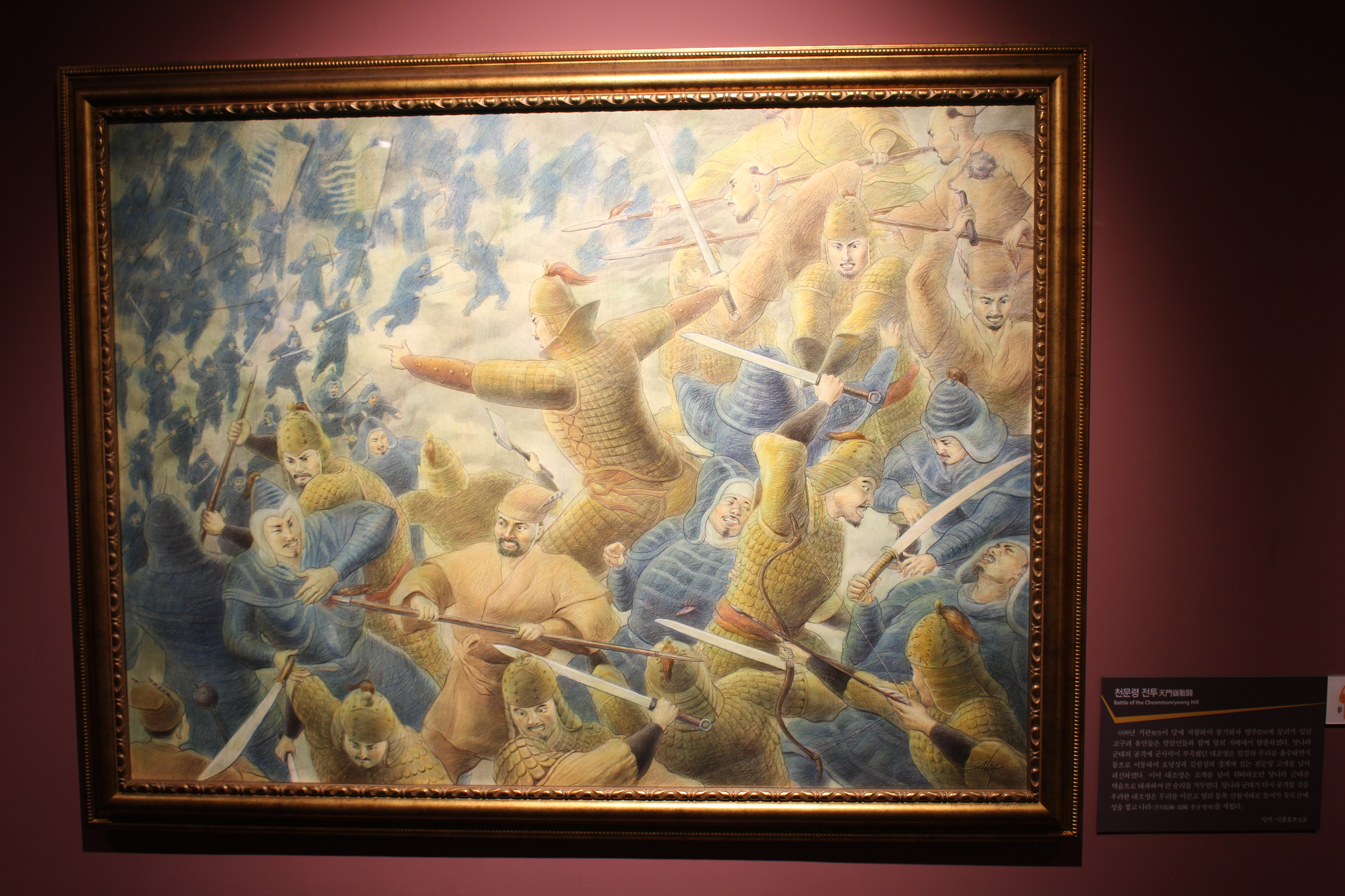 전쟁기념관 소장